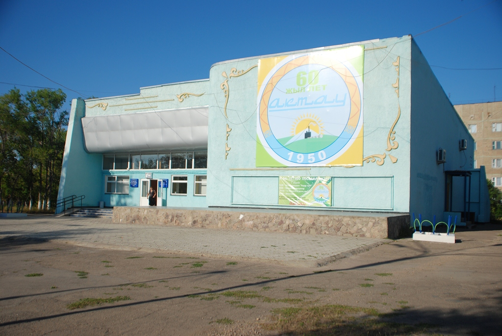 Коммунальное государственное казенное предприятие "Культурно-досуговый центр "Актау""